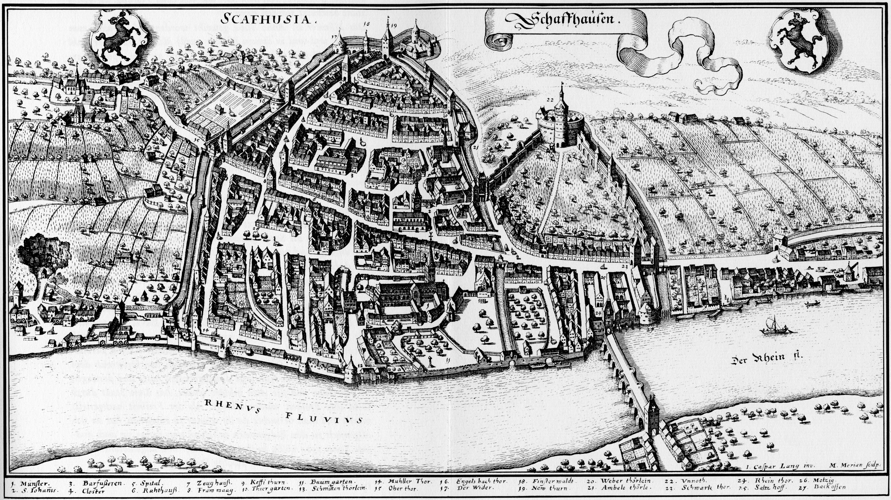 Ansicht der Stadt Schaffhausen, Schweiz, 1642